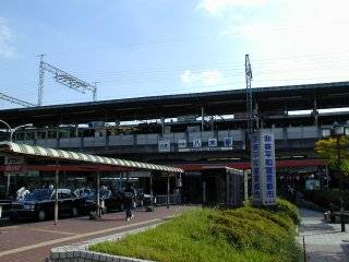 大和八木駅